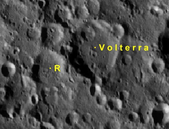 Cráter lunar Volterra. Cráteres satélite. (Imagen LRO)